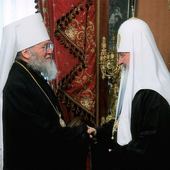 30 сентября 2010 года в Москве в рабочей Патриаршей резиденции в Чистом переулке состоялась встреча Преосвященного Митрополита Восточно-Американского и Нью-Йоркского Илариона, Первоиерарха Русской Зарубежной Церкви со Святейшим Патриархом Московским и всея Руси Кириллом.